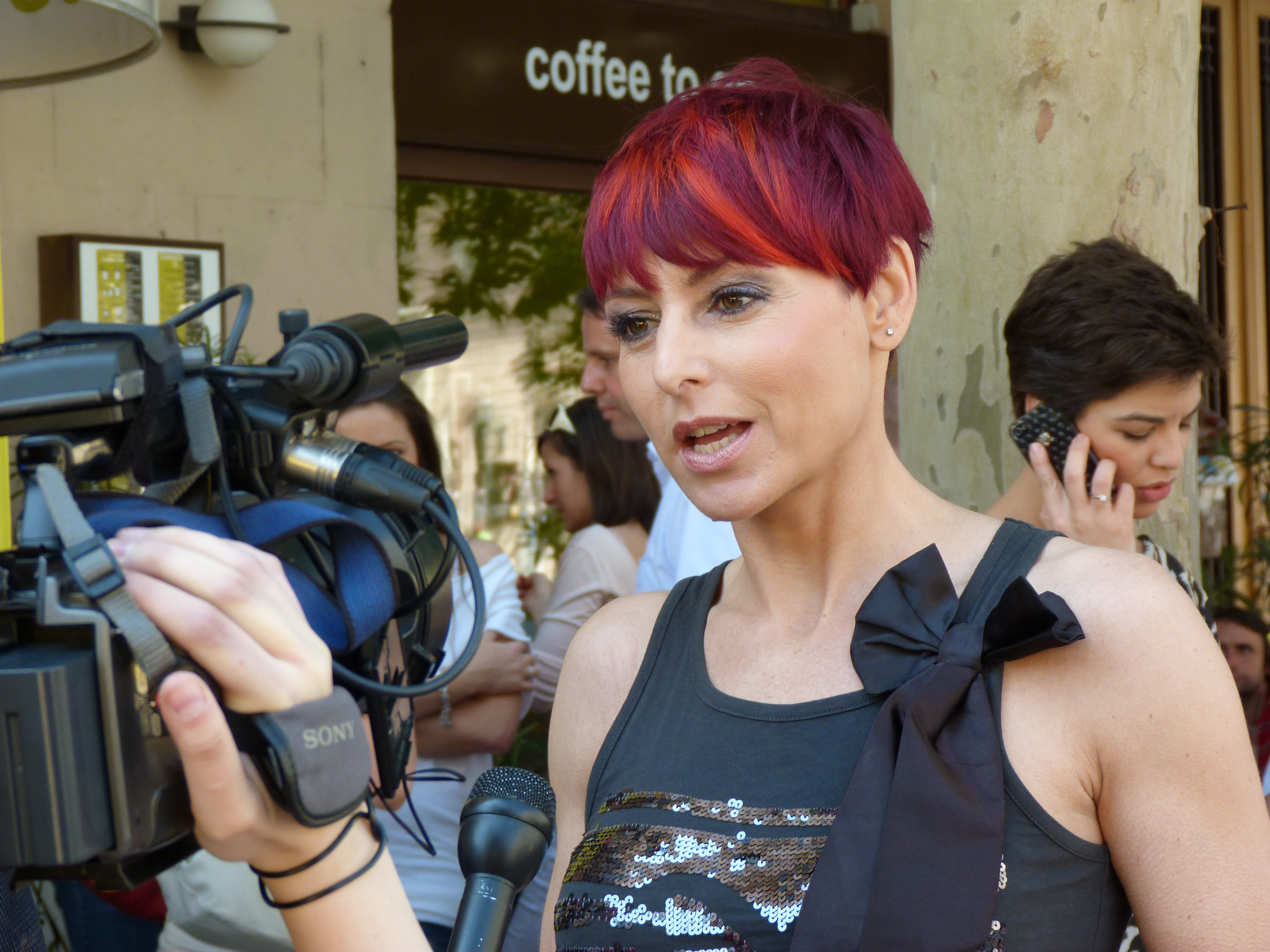 Erős Antónia pedagógus, újságíró, műsorvezető, az Egy Csepp Figyelem Alapítvány létrehozója